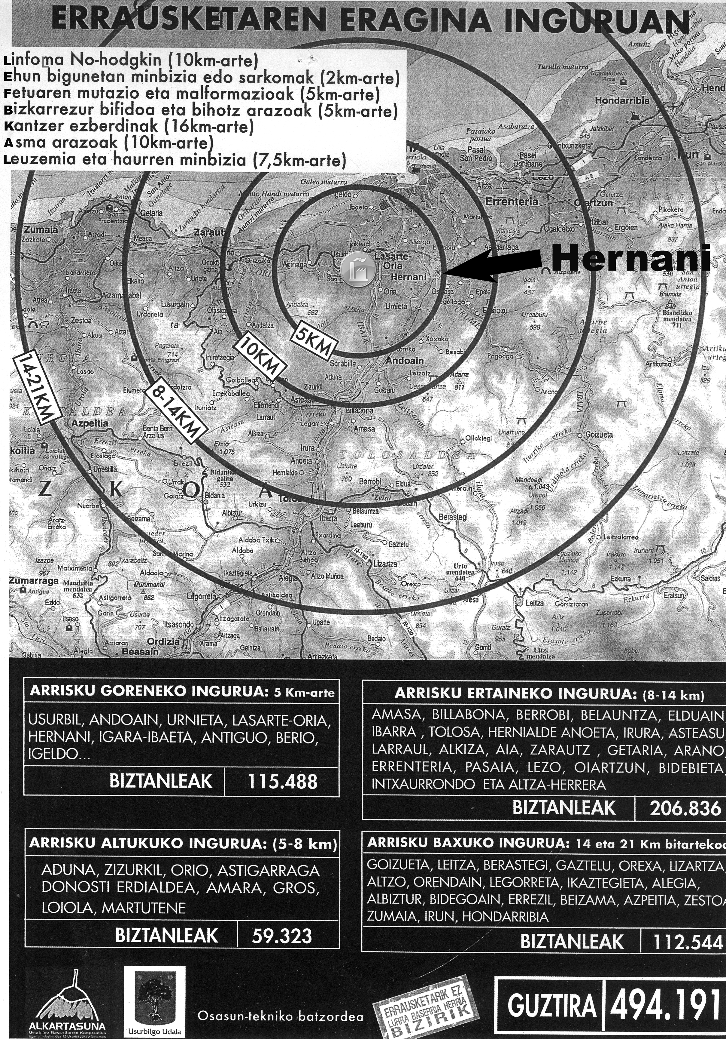 Afixa errausketaren arriskuez ohartaraziz.